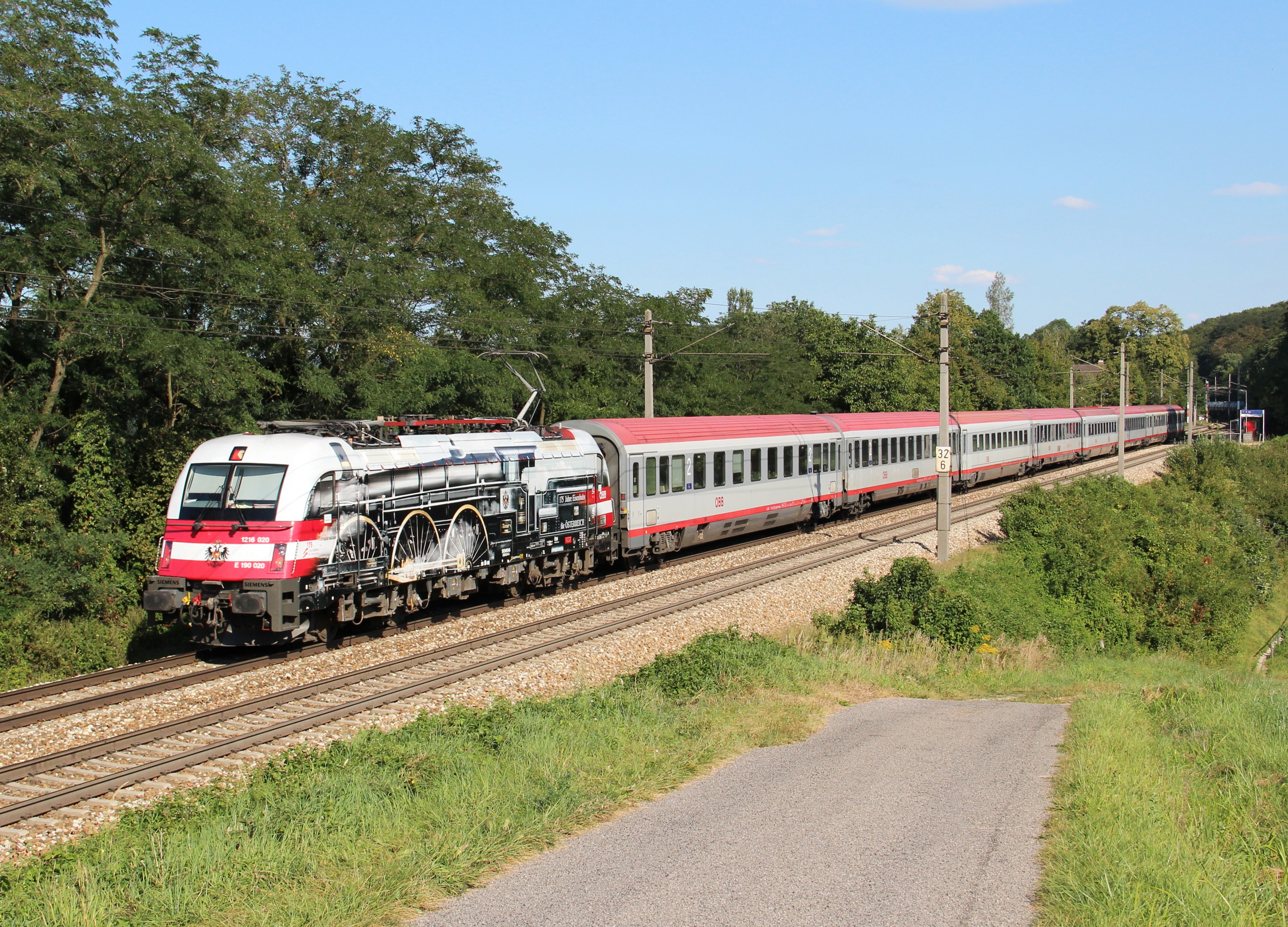 Die 1216.020 "175 Jahre Eisenbahn für Österreich" war am 29. August 2012 mit dem OIC 868 am Weg von Wien Westbahnhof nach Innsbruck Hbf und konnte hier in Unter Oberndorf abgelichtet werden.